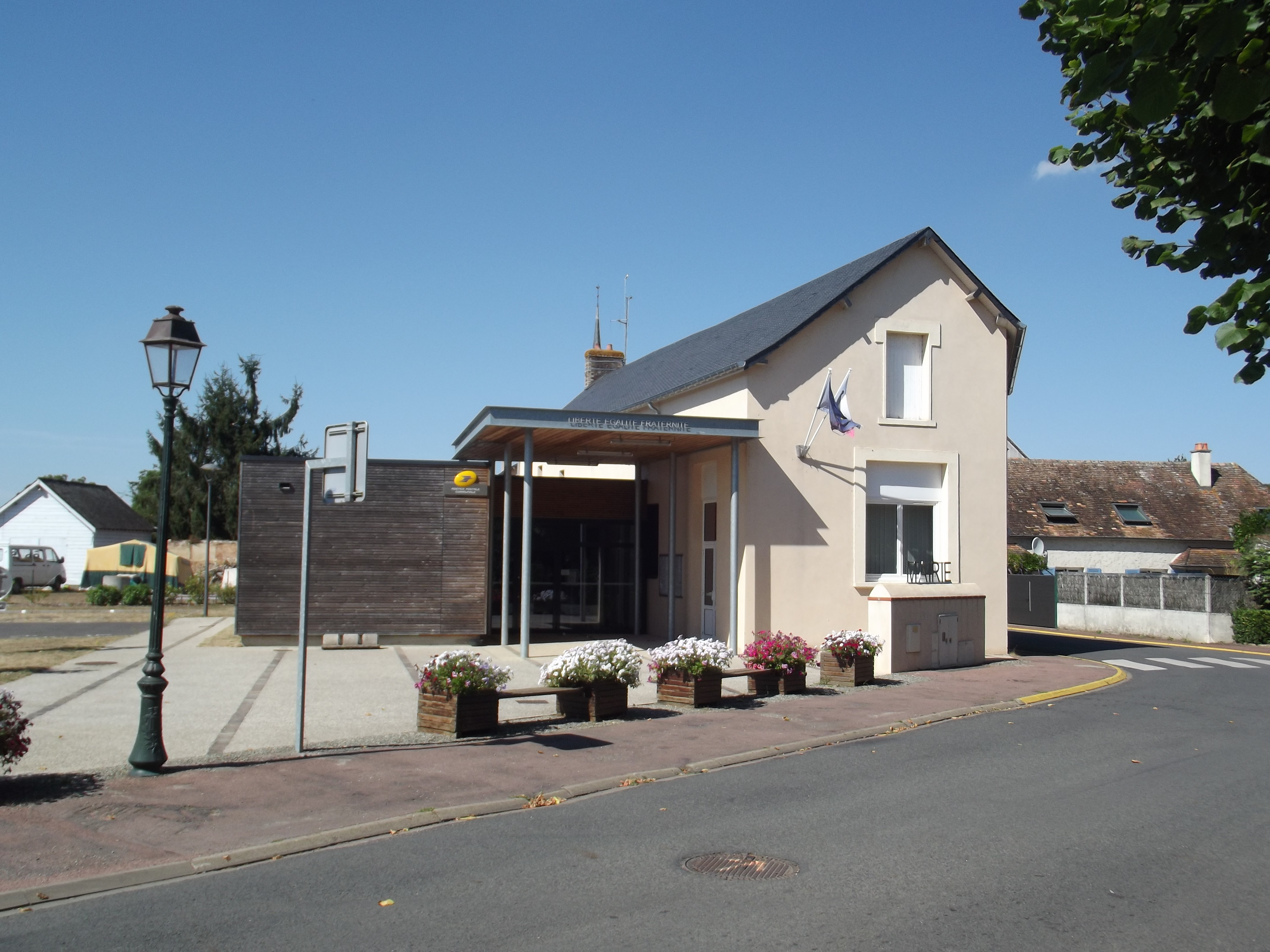 Mairie rénovée de Fillé sur Sarthe